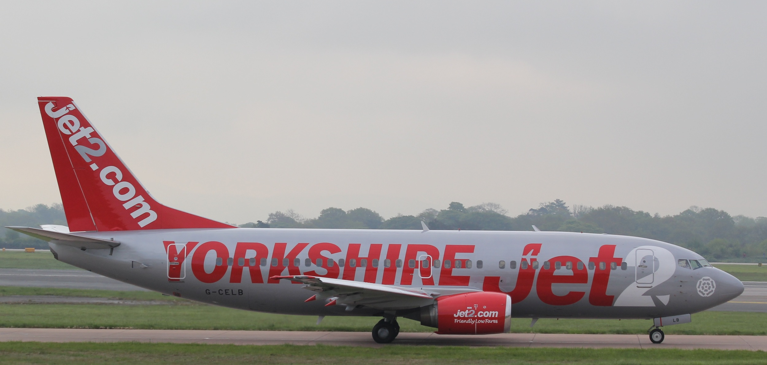 Jet2 Boeing 737-377